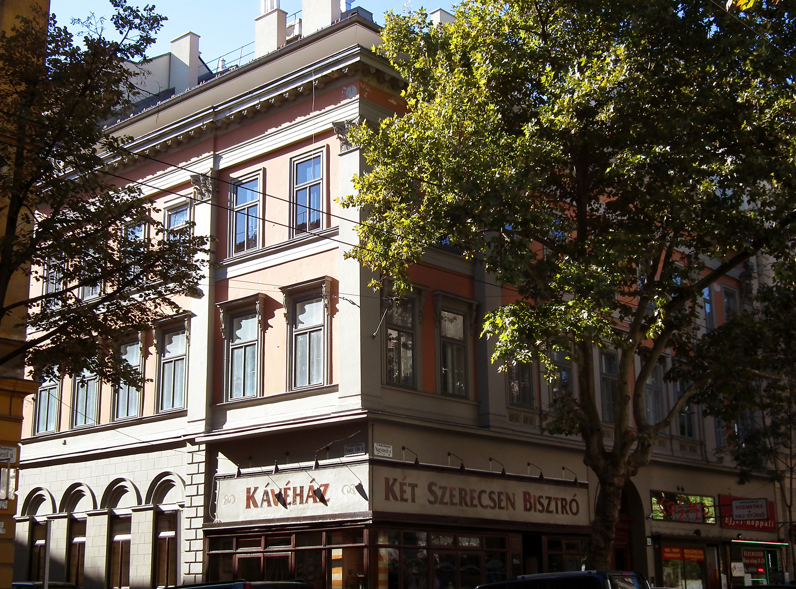 Sarokház (Budapest 6, Nagymező utca 14., Paulay Ede utca 48.) This is a photo of a monument in Hungary. Identifier: 760